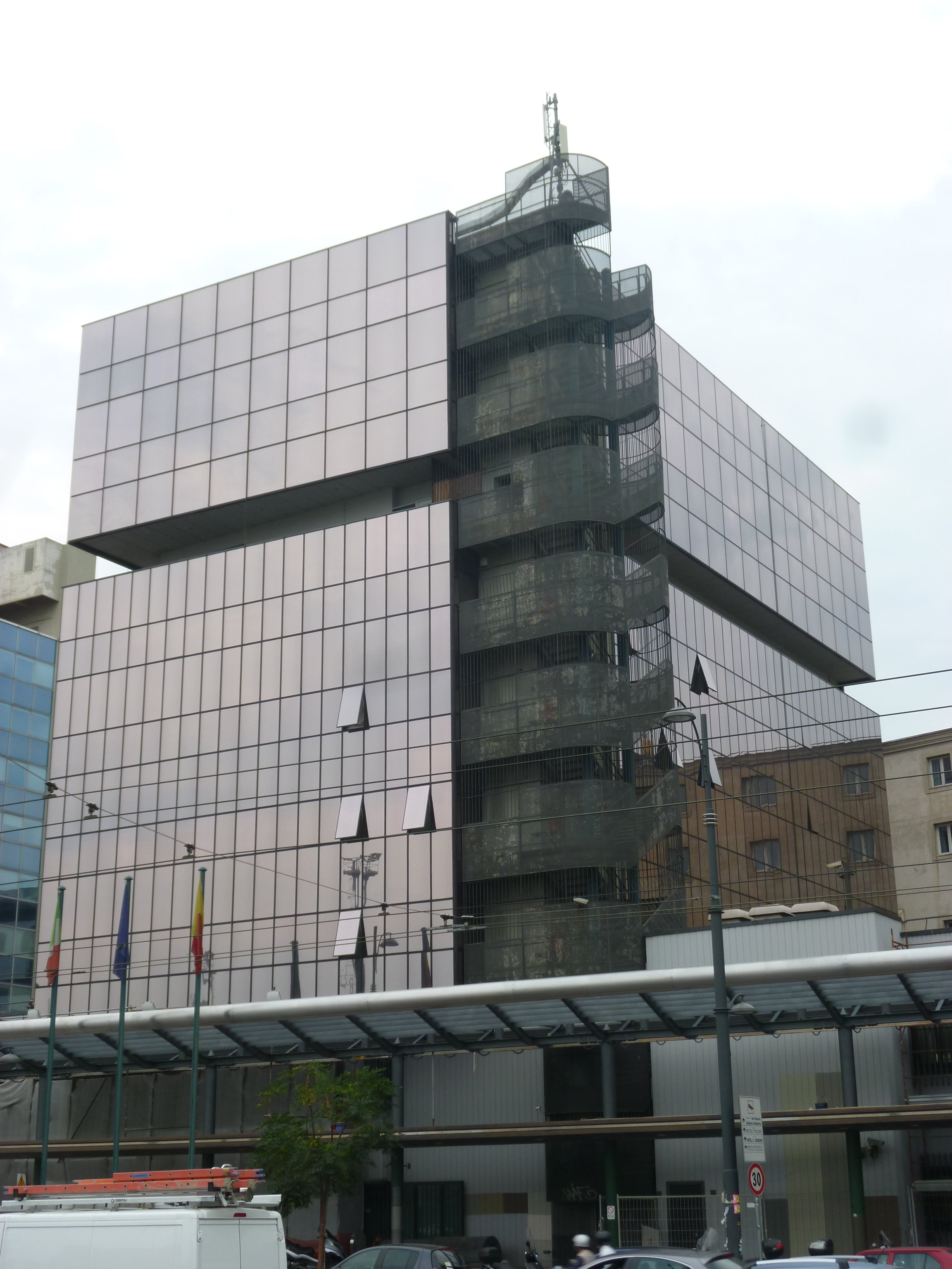 Napoli